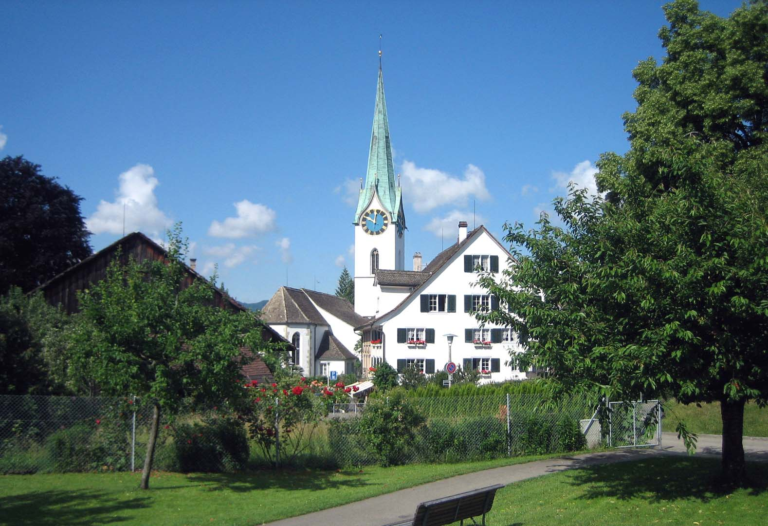 ref. Kirche Zollikon